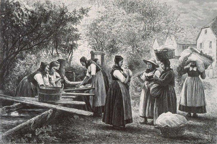 Une lessive à Metzeral. Bibliothèque nationale et universitaire de Strasbourg